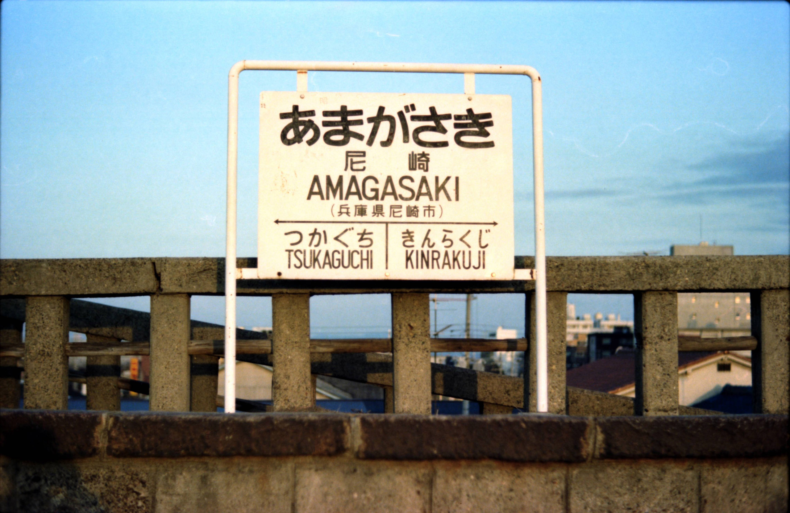 JNR Fukuchiyama-Line Amagasaki sta name Board